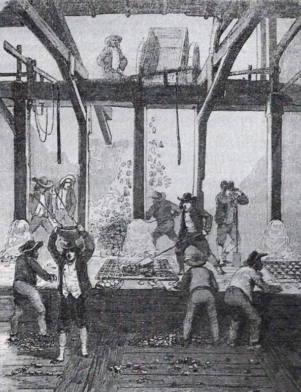 Enfants laveurs aux grilles, mines de Poullaouen (dessin de Mme C. P. paru dans le journal L'Illustration du 14 juin 1845